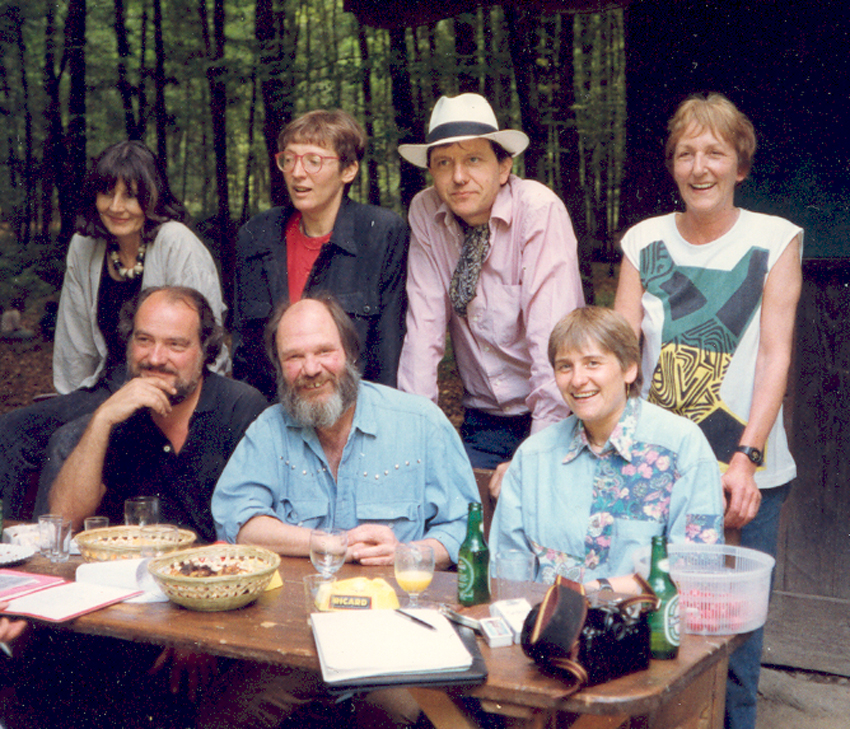 Le comité des Editions d'En-Bas au complet lors du quinzième anniversaire des éditions en juin 1991. De gauche à droite : Ursula Gaillard, Elena Urbanovici, Gilbert Musy et Margrit Patrocle (debouts); Pierre Chessex, Michel Glardon et Marie-Ange Wicky (assis).